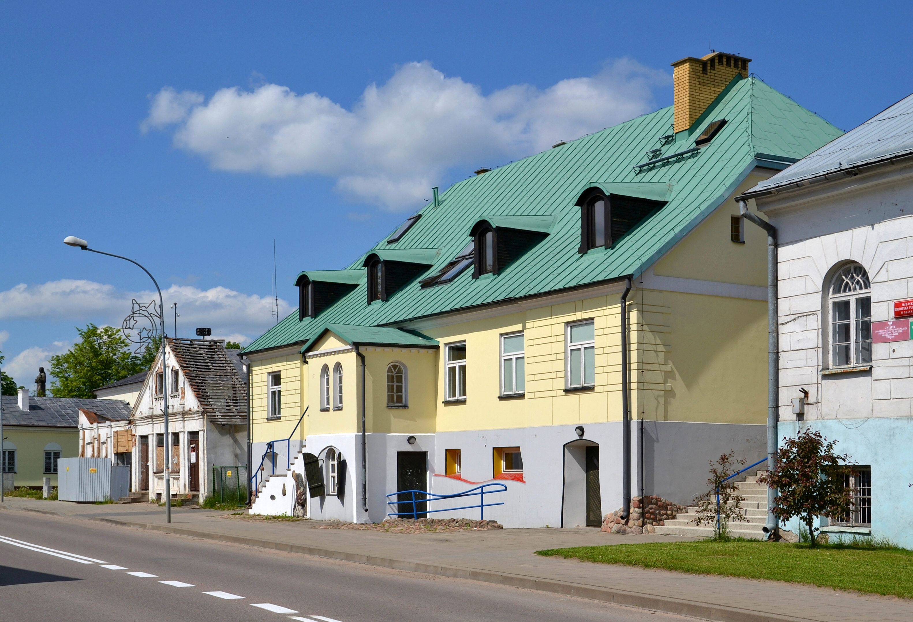 Sejny (Seinai) - dawny urząd pocztowy, wcześniej gimnazjum hebrajskie